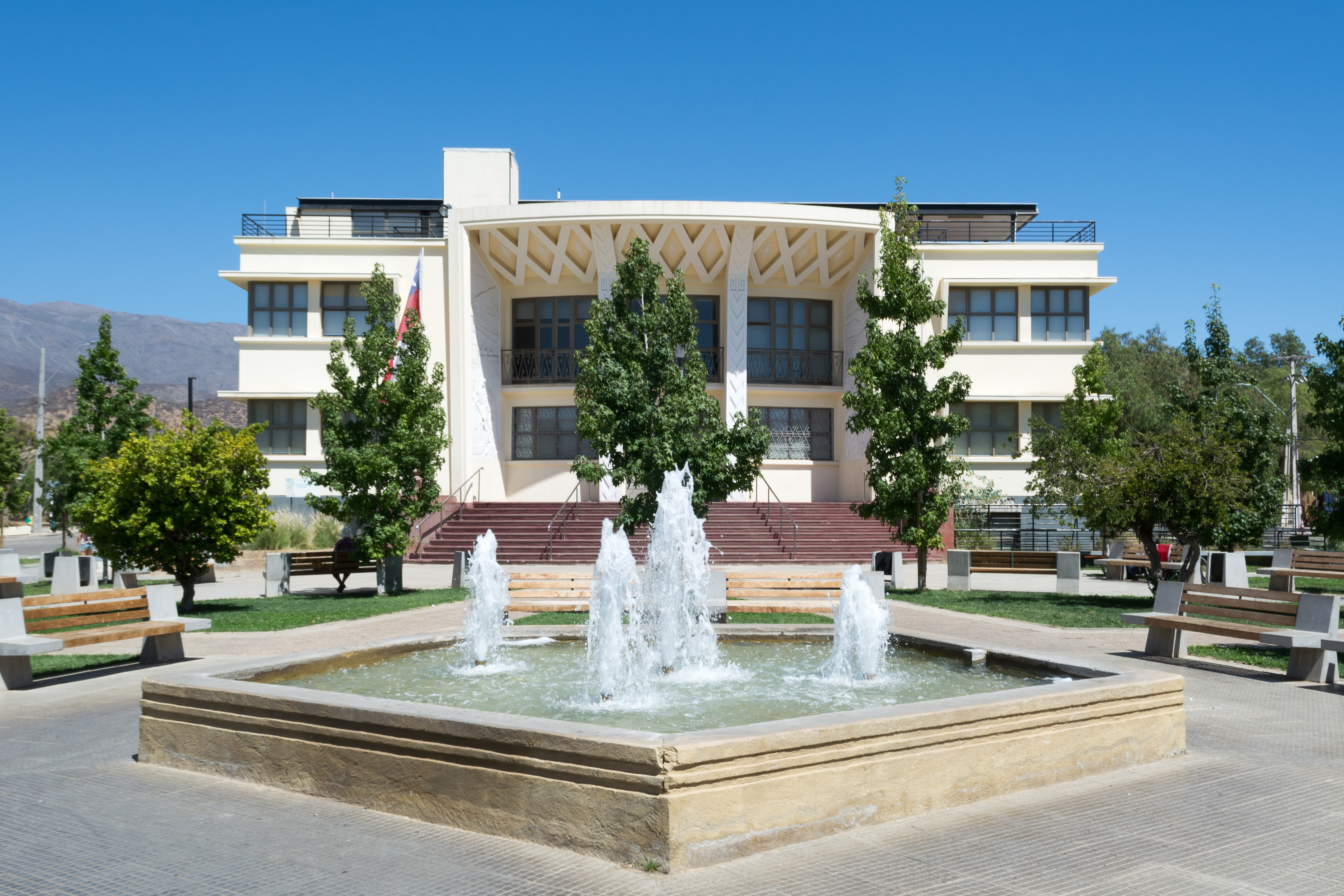 Edificio Consistorial, Tiltil, Región Metropolitana de Santiago, Chile